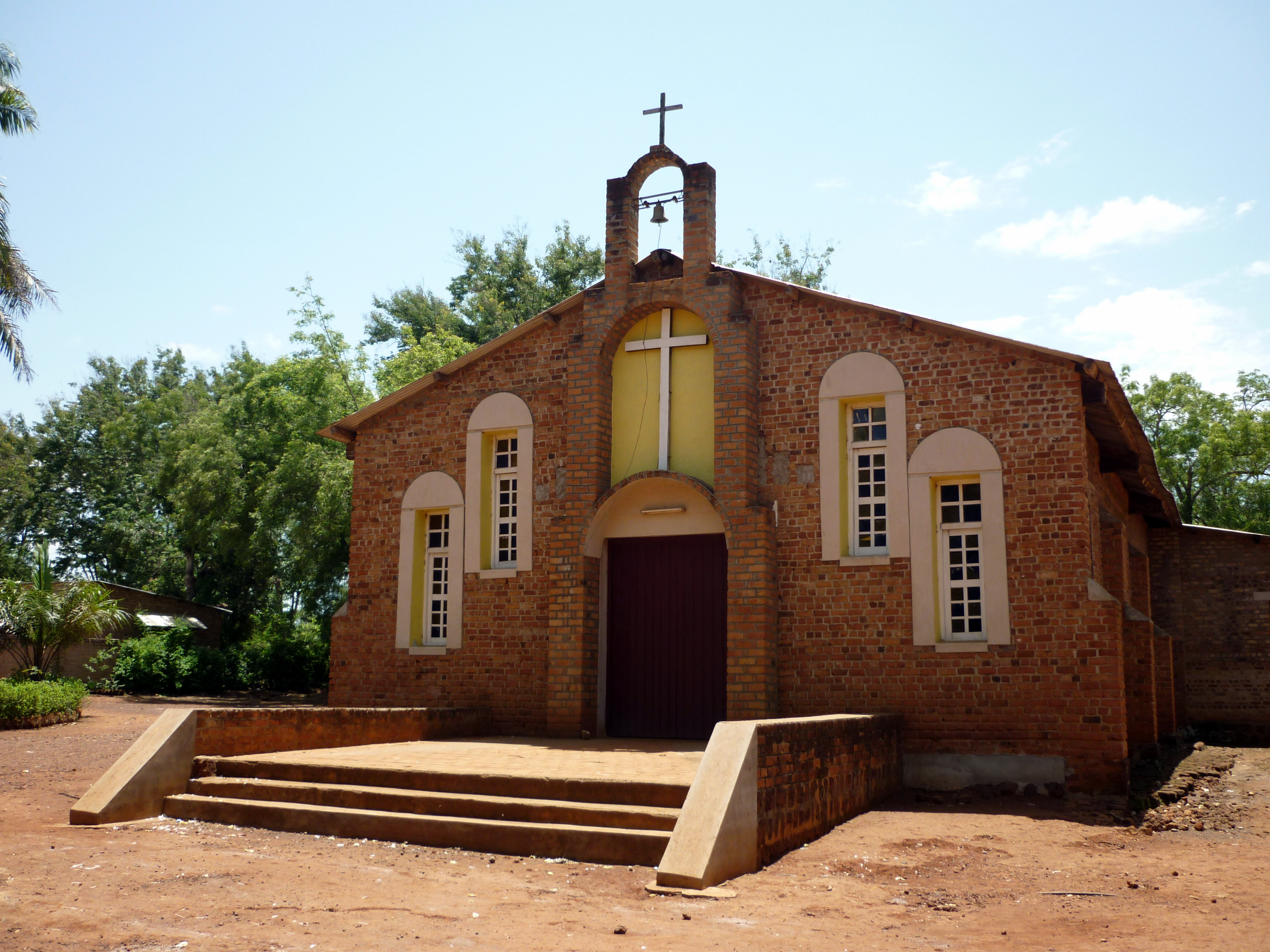 Parroquia St. Jean Baptiste (Zémio, República Centroafricana)